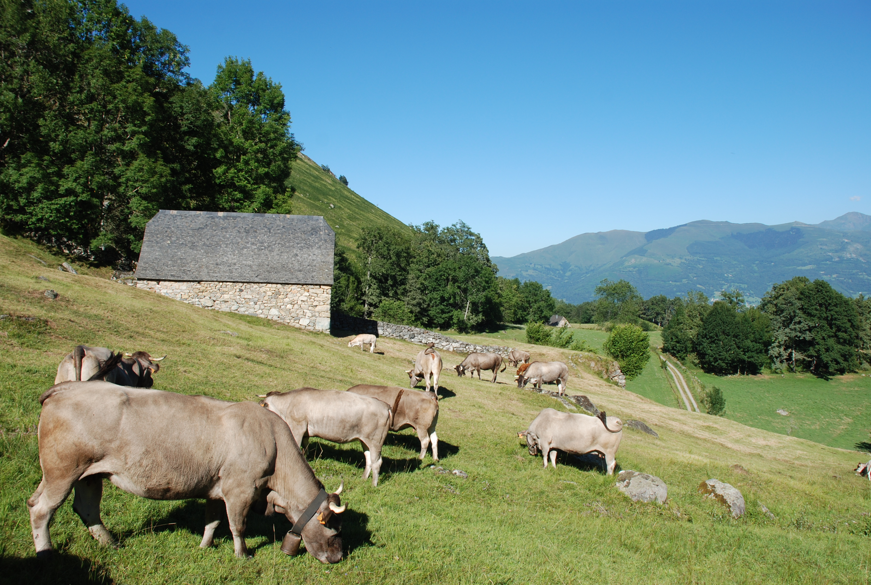 Arcizans-Dessus, Hautes-Pyrénées, France, grange foraine et vaches de race bazadaise